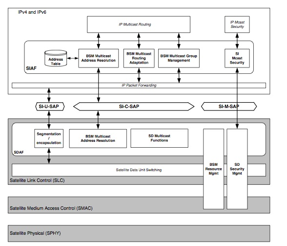 imagen protocolo BSM